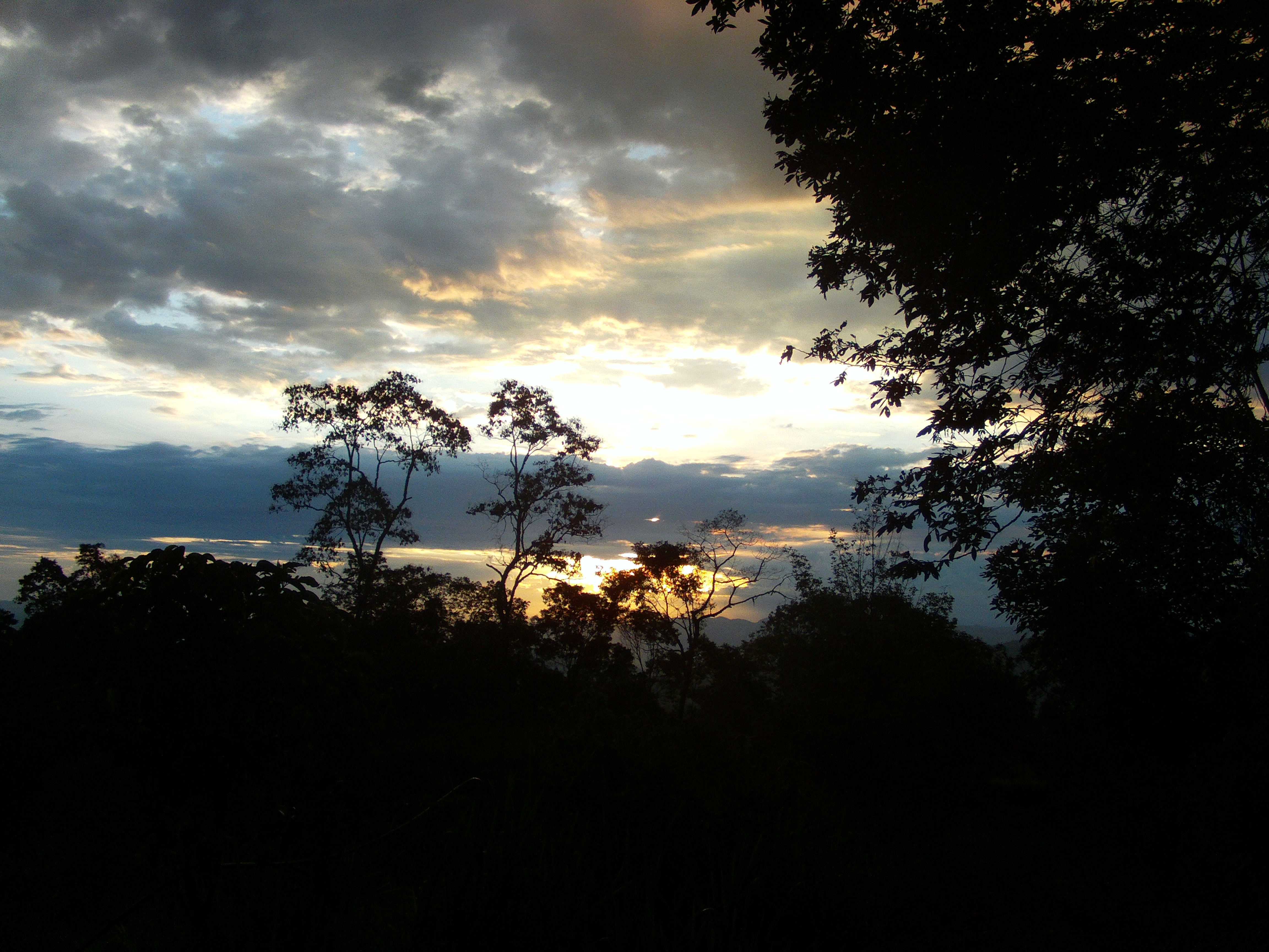 Amanecer en Colombia el sol saliendo